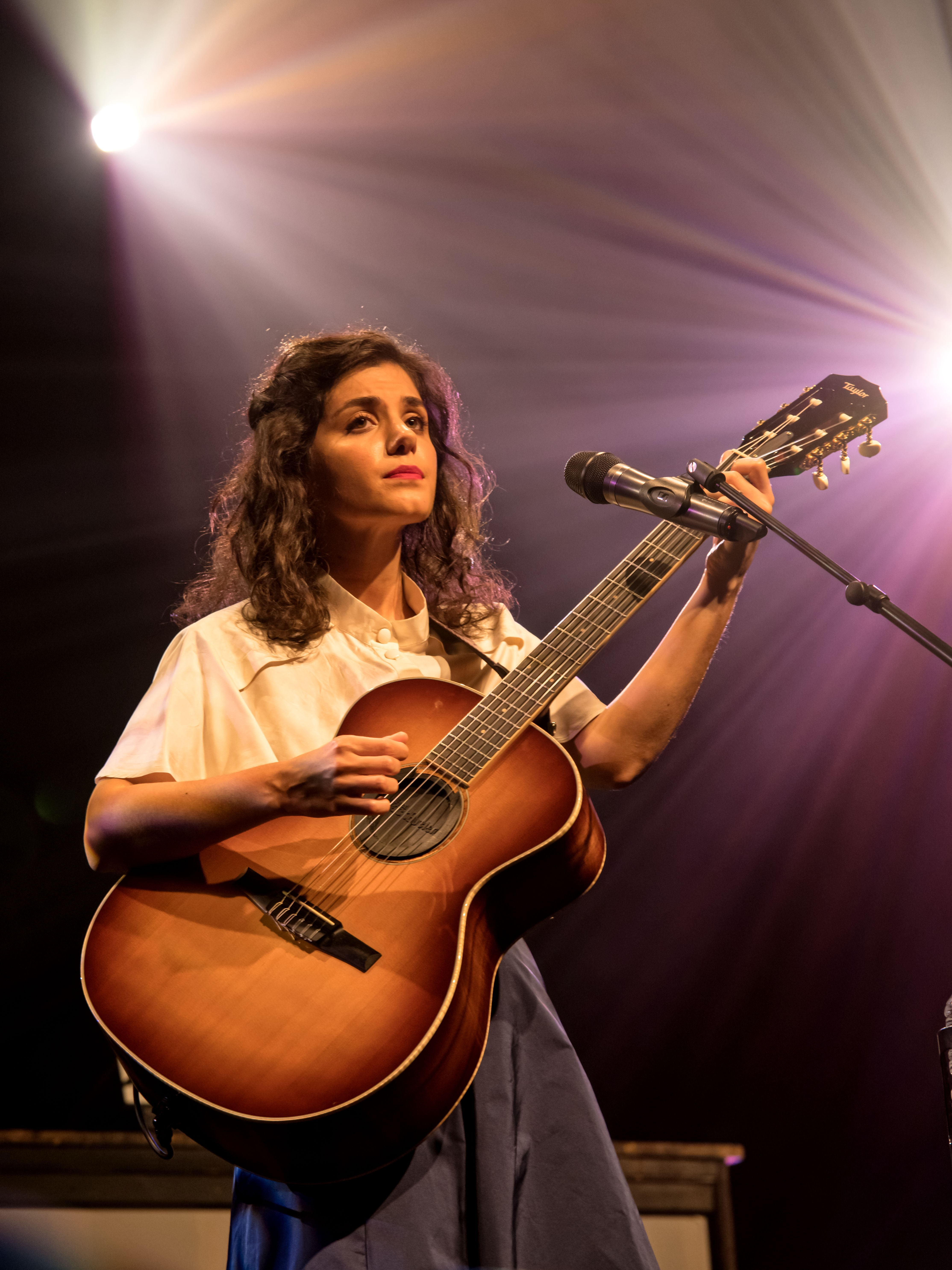 Bilder vom Zelt Musik Festival 2016 in Freiburg im Breisgau Katie Melua